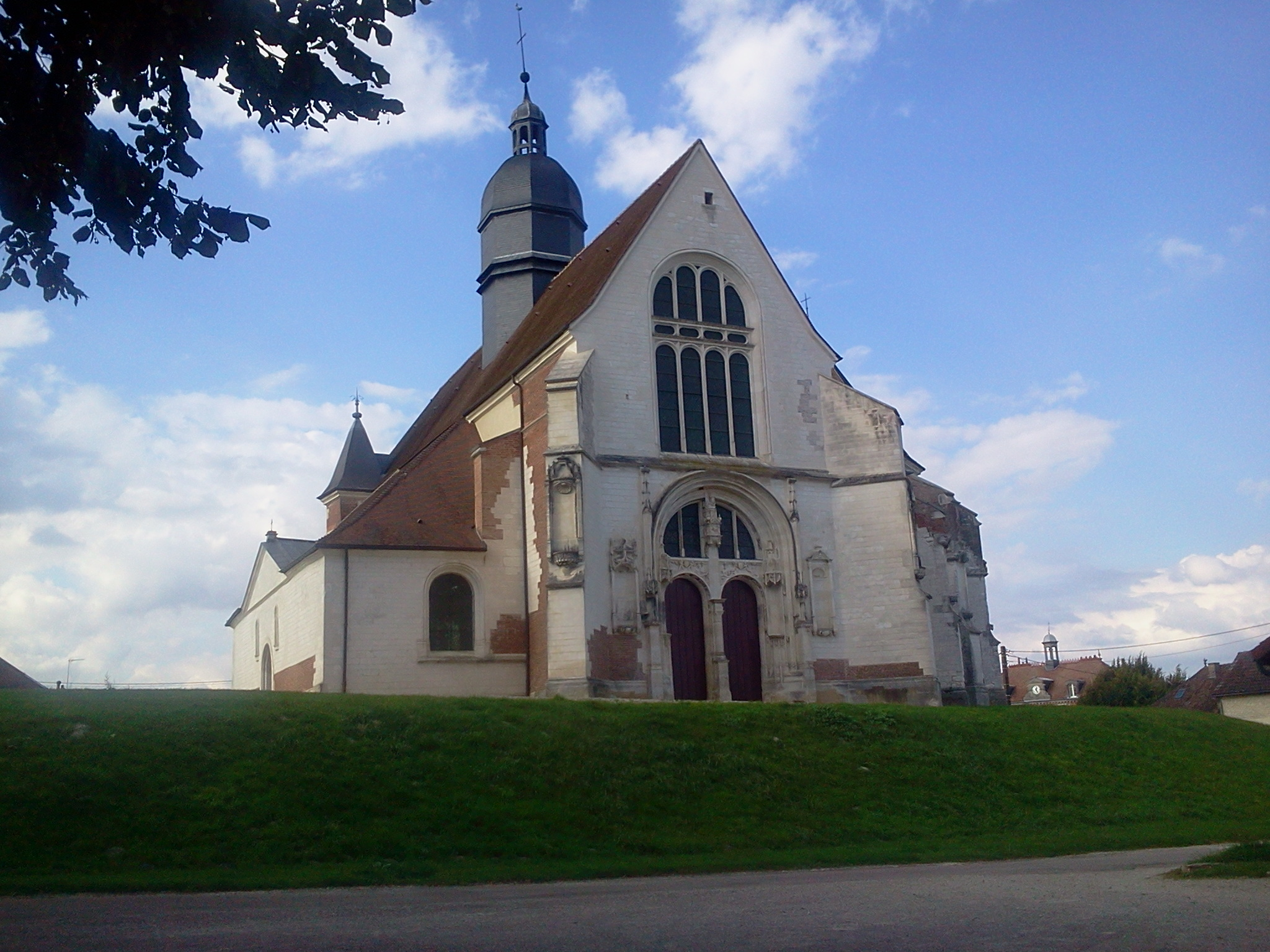 Église Saint-Phal .